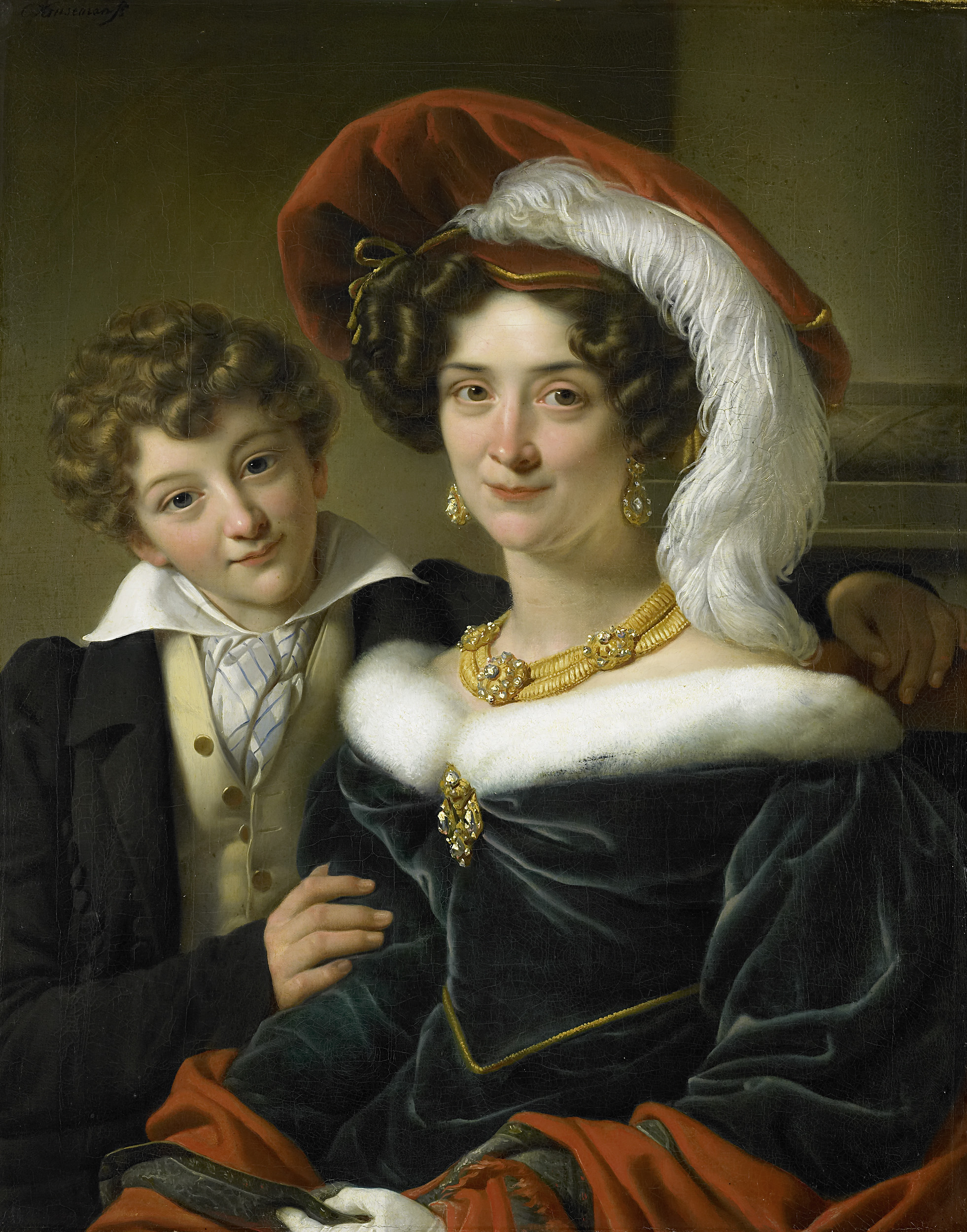 Portret van gravin Rudolphina Wilhelmina Elizabeth de Sturler, tweede echtgenote van Johannes graaf van den Bosch met hun zoon Richard Leeuwenhart. De vrouw zittend in een stoel, ten halven lijve, met een hoed met pluim. De jongen heeft zijn arm over de schouders van zijn moeder gelegd. Pendant van SK-A-2166.